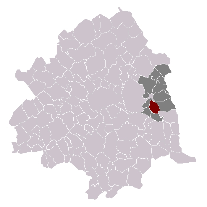 Chéreng dans son canton et son arrondissement.